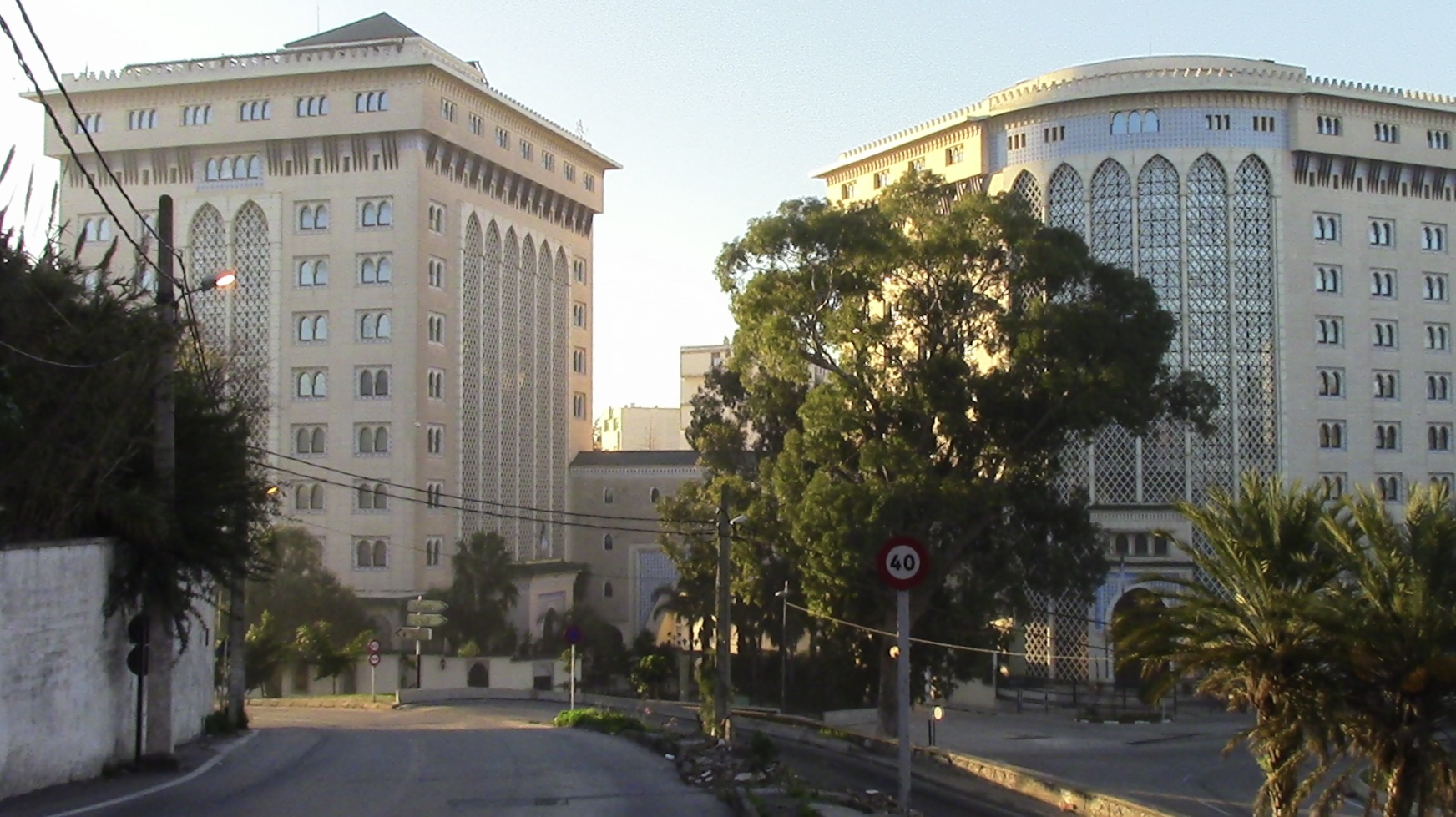 Ministère de l'Énergie (les deux tours)